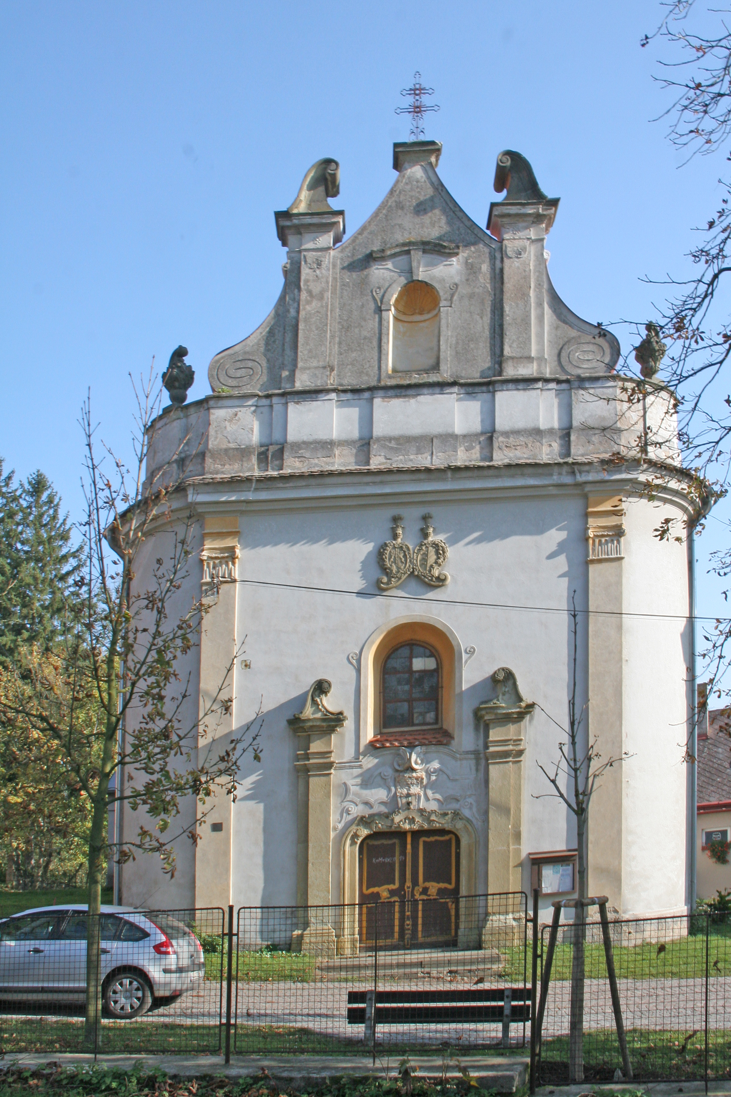 Kostel svatého Martina biskupa, Zámrsk.